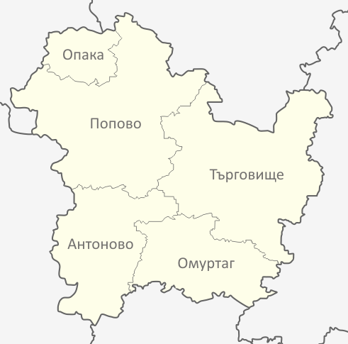 Картата е създадена от Любомир Таушанов